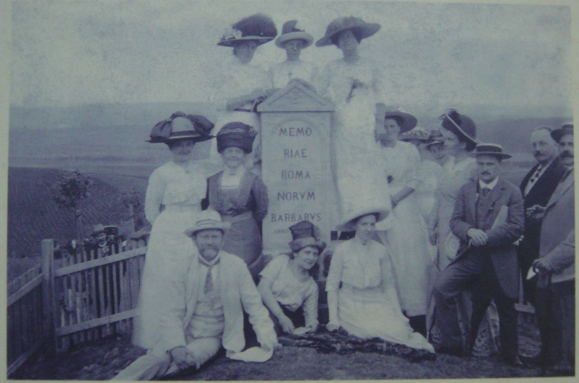 „Barbarenstein“ (1912) am Römerturm bei Pohlheim, am Obergermanischen Limes. Aus der Hinweistafel: "(...) Der Turm steht auf einem Grundstück, das der Gießener Psychatriedirktor Prof. Dr. Robert Sommer 1910 vom Fürsten von Braunfels erwarb. Mit dem Ankauf sollte die drohende Zerstörung des an dieser Stelle noch hervorragend erhaltenen Wallgrabens durch landwirtschaftliche Nutzung verhindert werden. (...) Im Sommer 1912 ließ Robert Sommer gemeinsam mit seiner Frau Emmy hier einen Gedenkstein errichten, den sog. Barbarenstein. Seinen Namen verdankt der Stein der eingemeißelten Inschrift. Sie gibt Zeugnis von der Geschichtsauffassung zu Beginn des 20. Jahrhunderts, die auf eine Polarisierung zwischen römischer Zivilisation und einem idealisierten Germanentum abzielte (...) Vorderseite: LIMES IMPE RII ROMANI (Grenze des römischen Reiches) Rückseite: MEMO RIAE ROMA NORUM BARBARUS ANNO MDCCCCXII (Dem Andenken der Römer, ein Barbar im Jahre 1912) Im Vordergrund im hellen Anzug Robert Sommer, rechts stehend neben dem Grenzstein Emmy Sommer." Stein heute: Image:Turmstelle Wp. 4-49 (4).JPG Zu Robert Sommer: hw: Dokument tiefer Freundschaft. Im Geschichtsverein sprach Ulrike Enke über Robert Sommers Wanderbuch, Gießener Allgemeine, 6. März 2010, Nr.55, S.31 "Die Wanderungen selbst führten meist zu Zielen in der näheren Umgebung, wobei Sommer eine besondere Liebe zum Limes gezeigt habe, die sich an dem von ihm bei Grüningen gesetzten Limesstein heute noch dokumentiere."